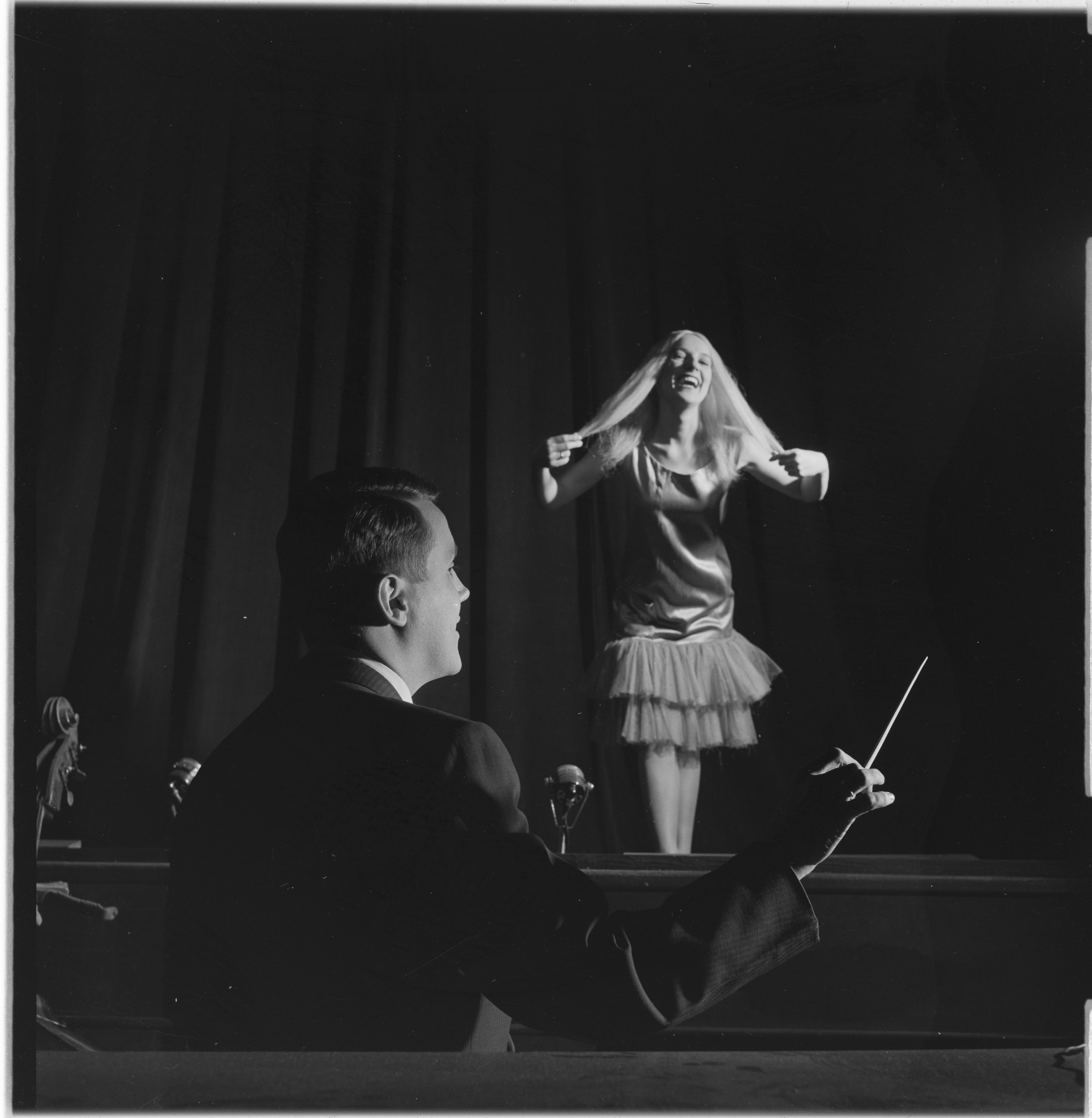 Bildet er hentet fra Arkivverket. Egil Monn Iversen og Sølvi, privat Arkivinstitusjon : Riksarkivet Arkivnavn : Billedbladet NÅ Sted : Norge, Ukjent, Ukjent, Avbildet